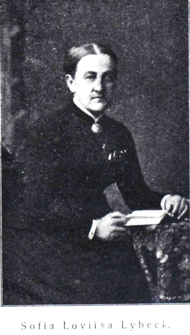 Kammion sairaskodin (Kammion sairaala) perustaja Sofia Lovisa (Sophie Louise) Lybeck (1840-1908)